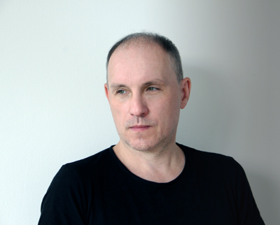 Tomasz Wójcik (grafik, scenograf)